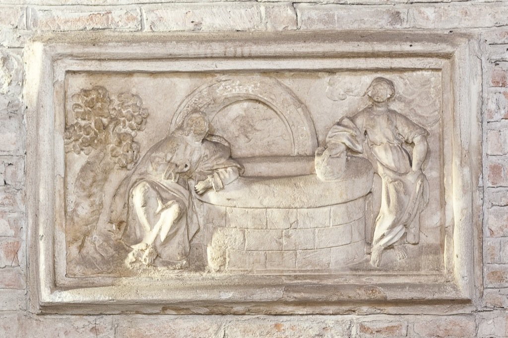 Bassorilievo - Gesù dialoga con la Samaritana al pozzo